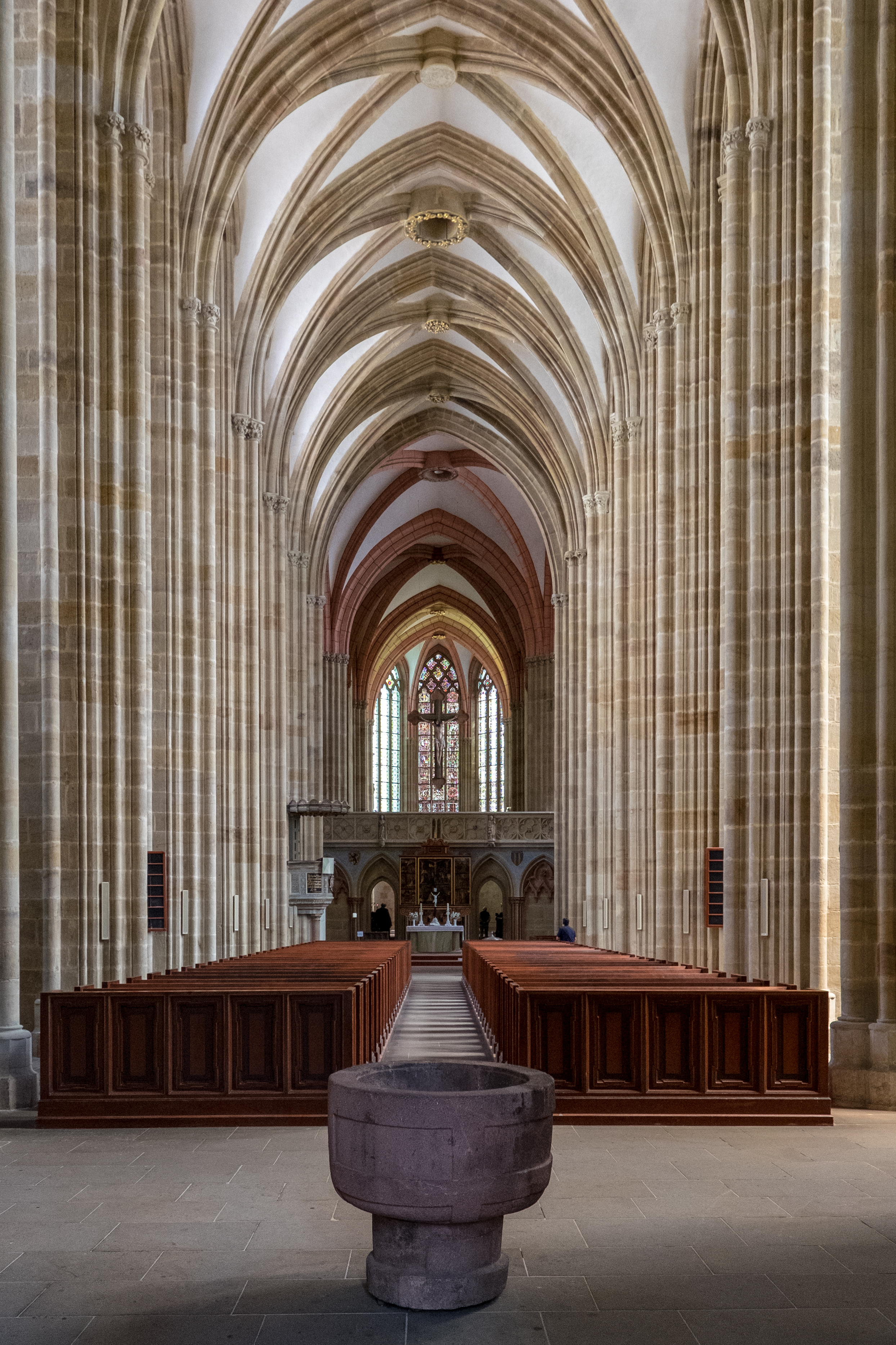 Der Innenraum des Meißener Doms